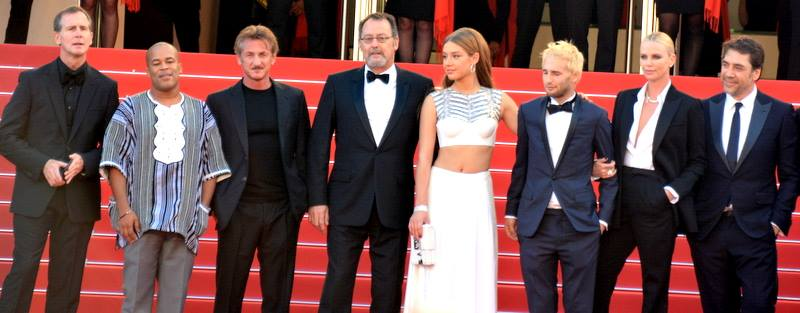 L'équipe du film "The Last face" au festival de Cannes. De gauche à droite : le producteur Matt Palmieri, l'acteur Zubin Cooper, le réalisateur Sean Penn, les acteurs Jean Reno, Adèle Exarchopoulos, Hopper Penn, Charlize Theron et Javier Bardem.